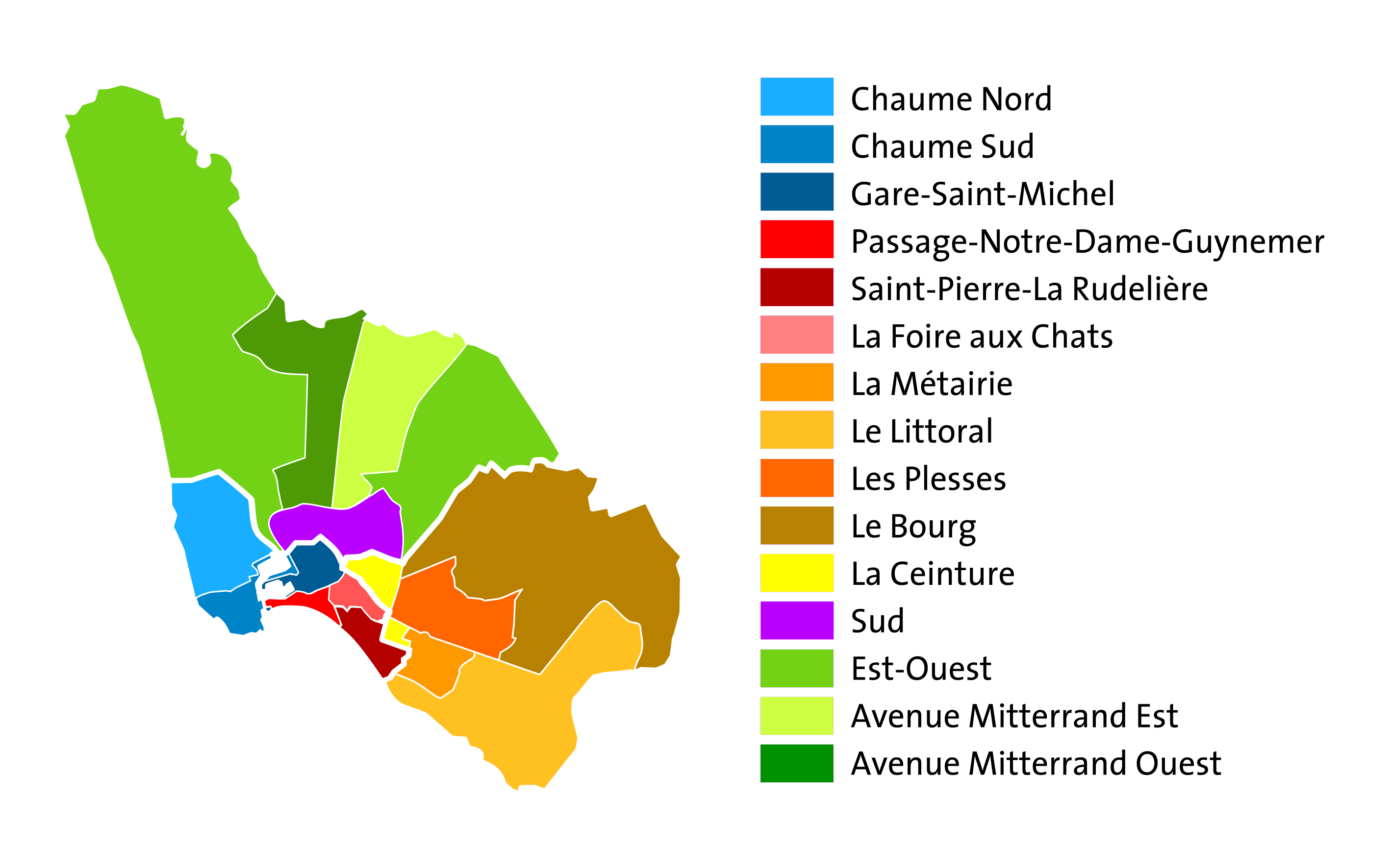 Carte des quartiers IRIS de la commune des Sables-d'Olonne au 1er janvier 2019